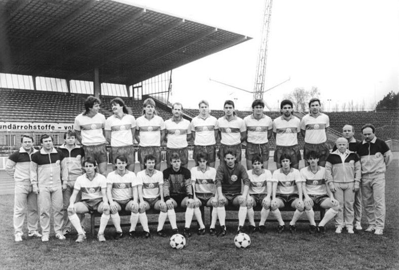 ADN-ZB-Sindermann-30.1.90-hep-Rostock: Fußball-Oberliga Saison 1989-90. Mannschaft des FC Hansa Rostock, hintere Reihe v.l.n.r. Jens Wahl, Gernot Alms, Volker Röhrich, Frank Rillich, Axel Rietentiet, Thomas Gansauge, Andreas Babendererde, Juri Schlünz und Rainer Jarohs. Vordere Reihe: stehend v.l.n.r. Trainer Werner Voigt, Trainer Jürgen Decker, Mannschaftsarzt Dr. Wolfgang Anft, sitzend v.l.n.r. Jens Dowe, Artur Ullrich, Hilmar Weilandt, Daniel Hoffmann (Torwart), Henri Fuchs, Jens Kunath (Torwart), Jens Leonhardt, Axel Schulz, Florian Weichert, stehend v.l.n.r. Physiotherapeut Günter Blum, Trainer Hans Albrecht und Mannschaftsleiter Herbert Maron.